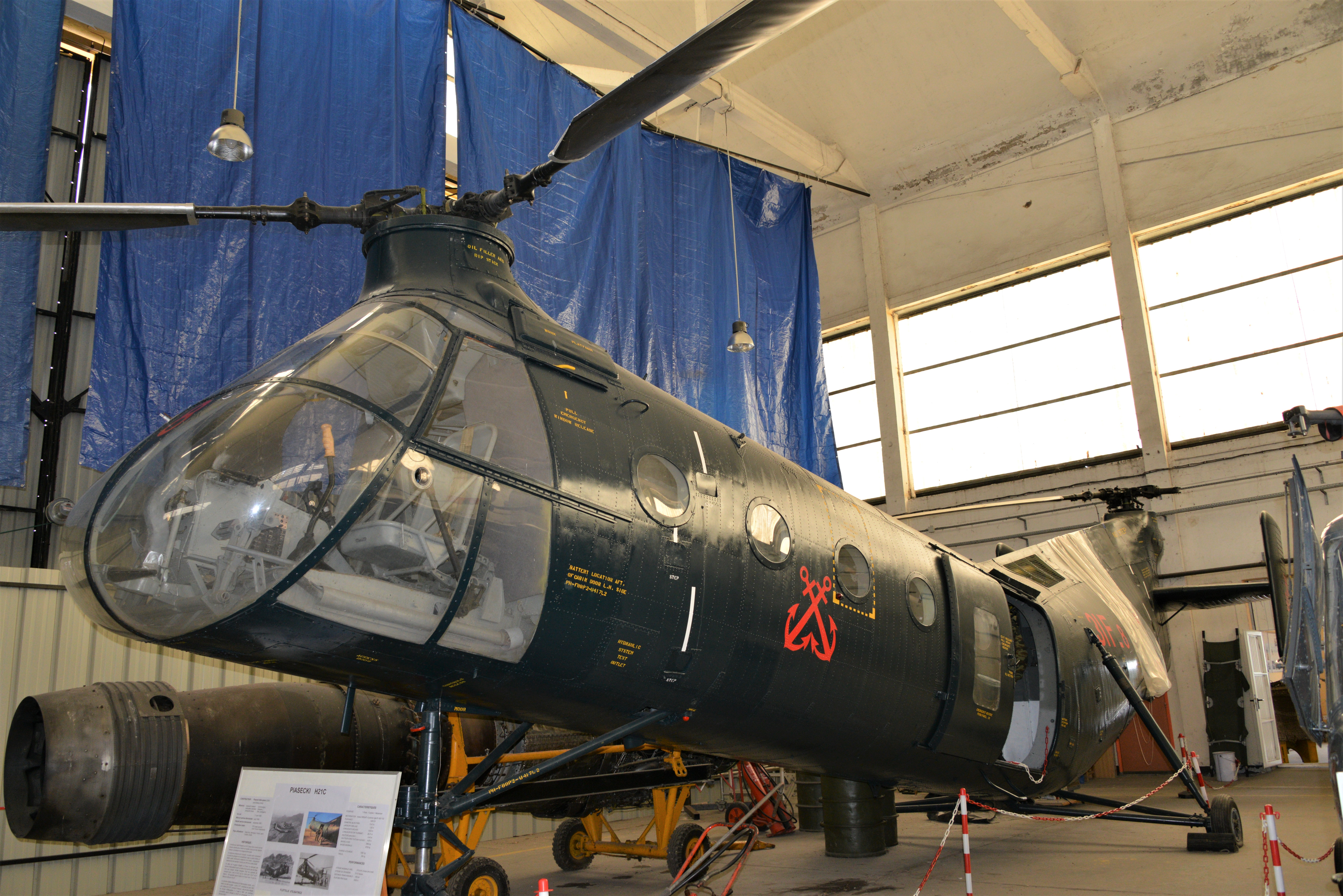 Pièce des collections du musée de l'aéronautique navale de Rochefort-sur-Mer : un hélicoptère Piasecki Vertol H 21 FR (1952), plus connu en France sous le nom de « Banane volante », c’était l’hélicoptère de la guerre d’Algérie. Rochefort-sur-Mer, Charente-Maritime, France.